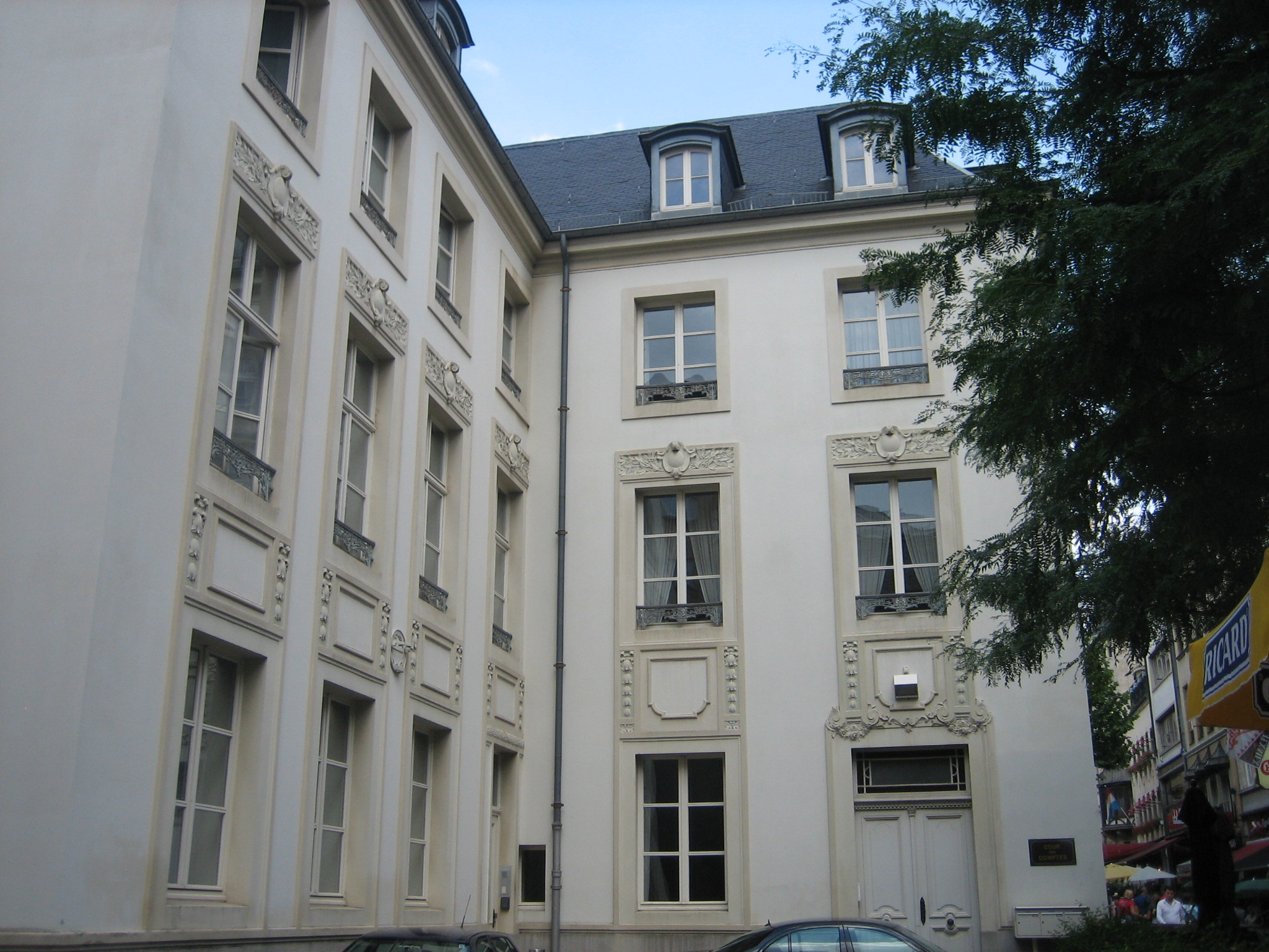 Revisionsretten i byen Luxemborg